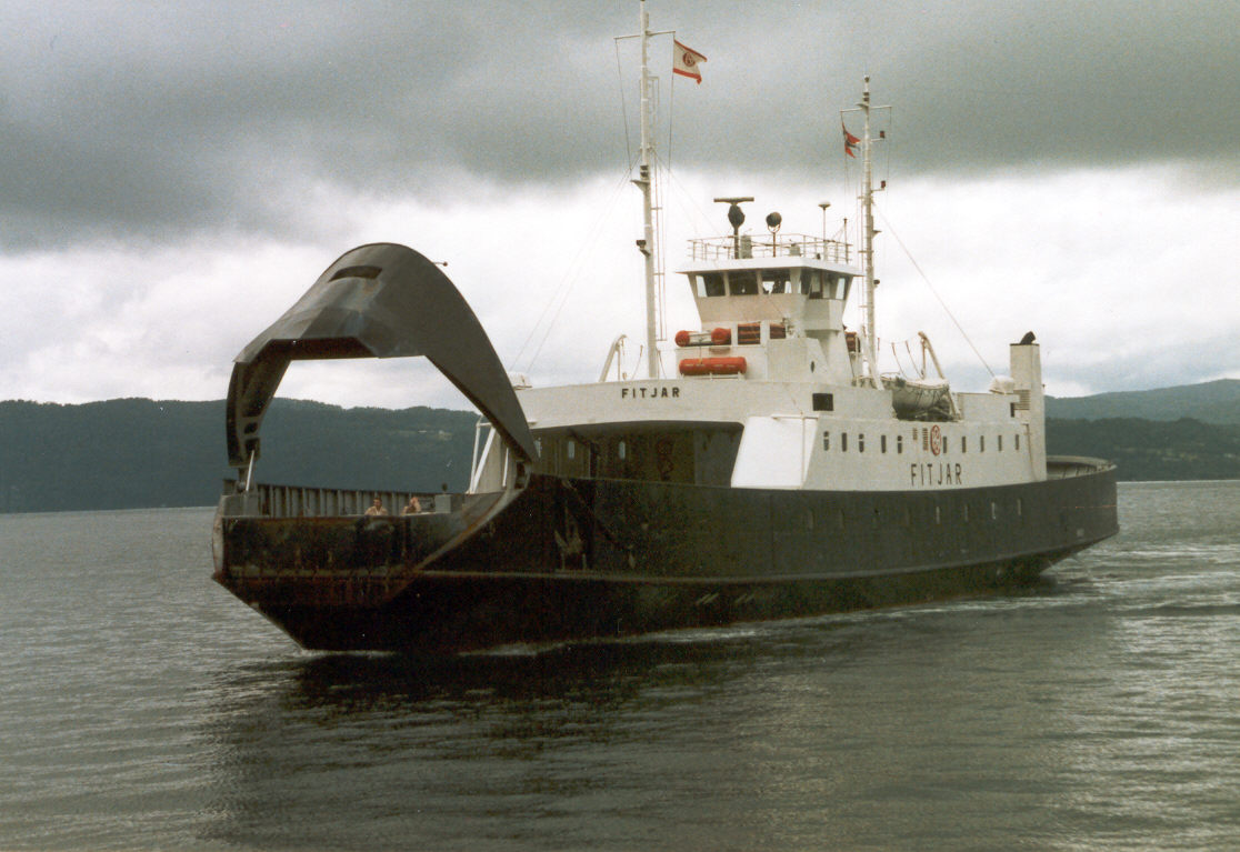 MF Fitjar, built 1973.